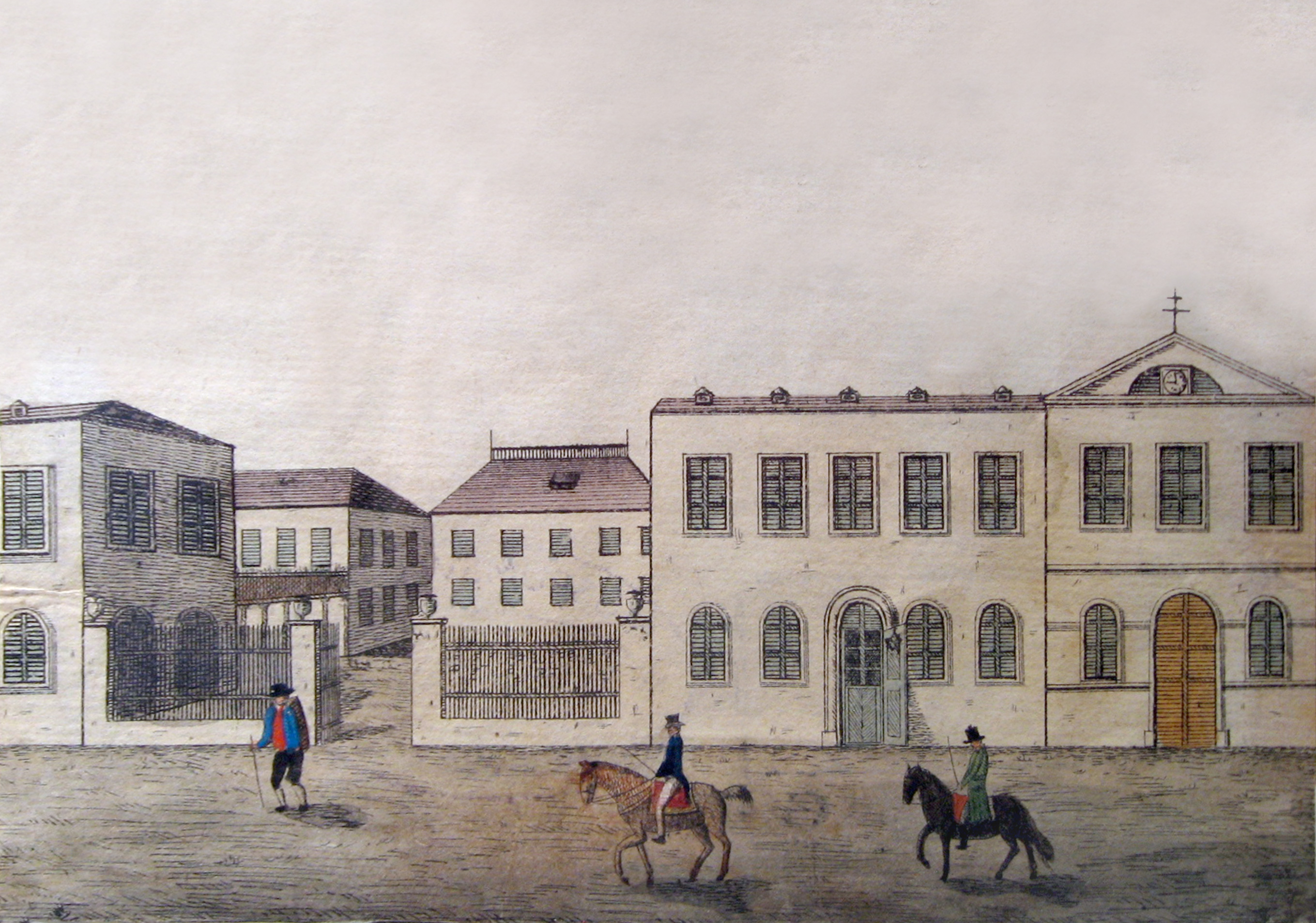 Lokalie Weinhaus